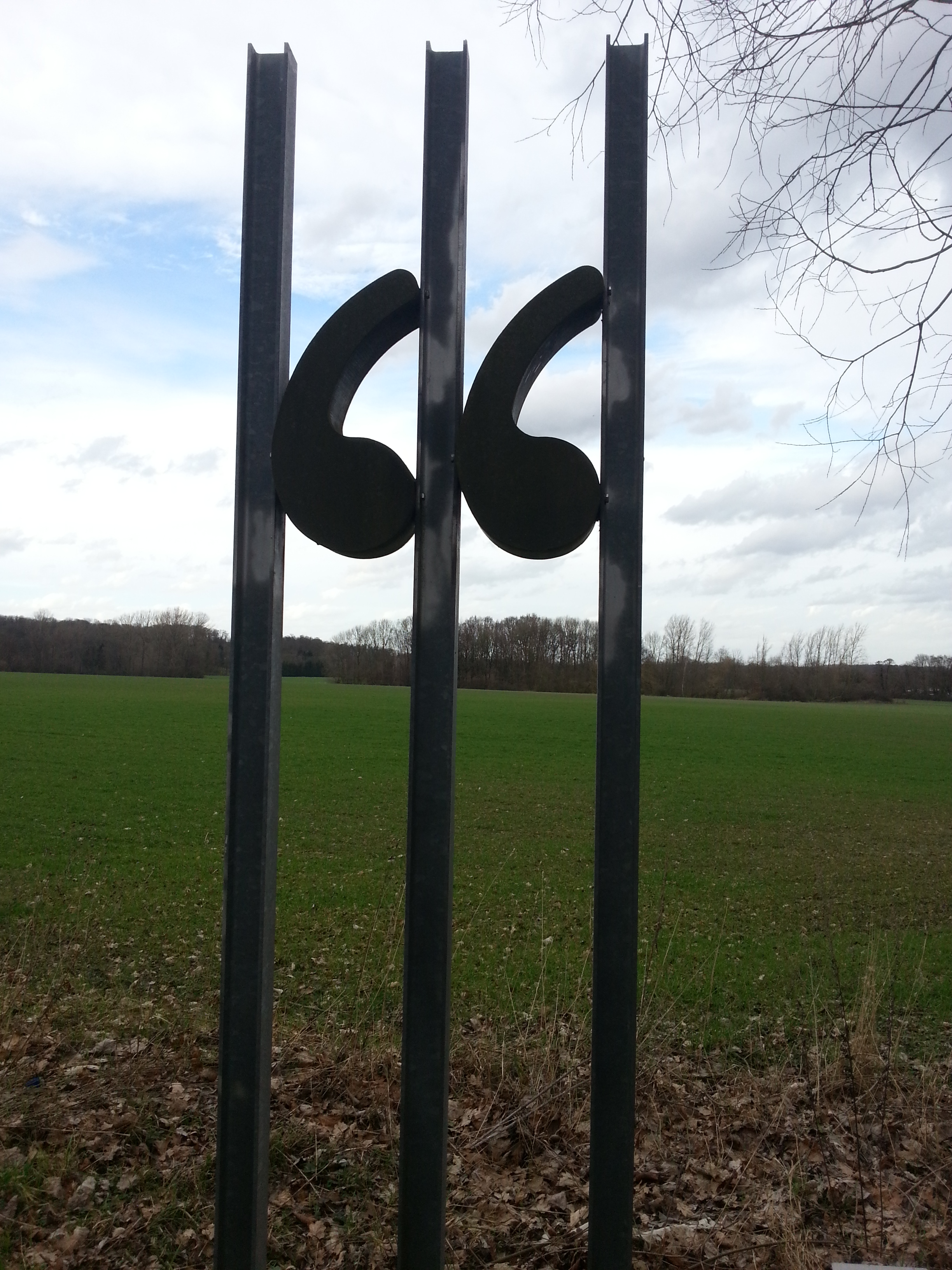 Anführungszeichen von Kirsten Kaiser an der Einmündung des Zufahrtsweges des Hofes Schulze Gassel in die Gasselstiege in Münster (Westf.).